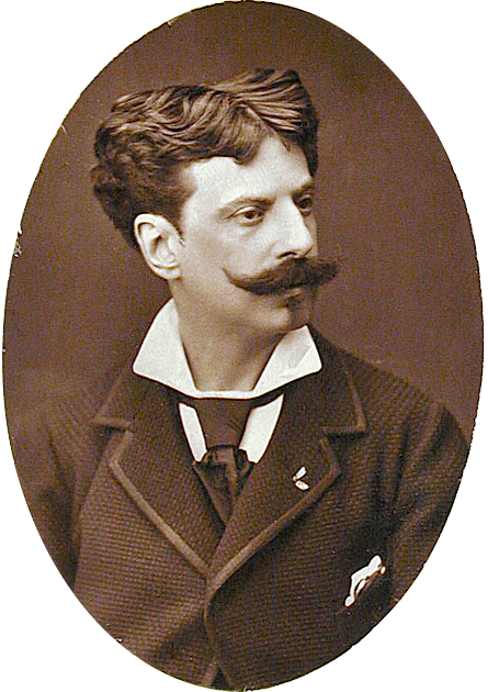 Portrait of Alphonse-Marie-Adolphe de Neuville